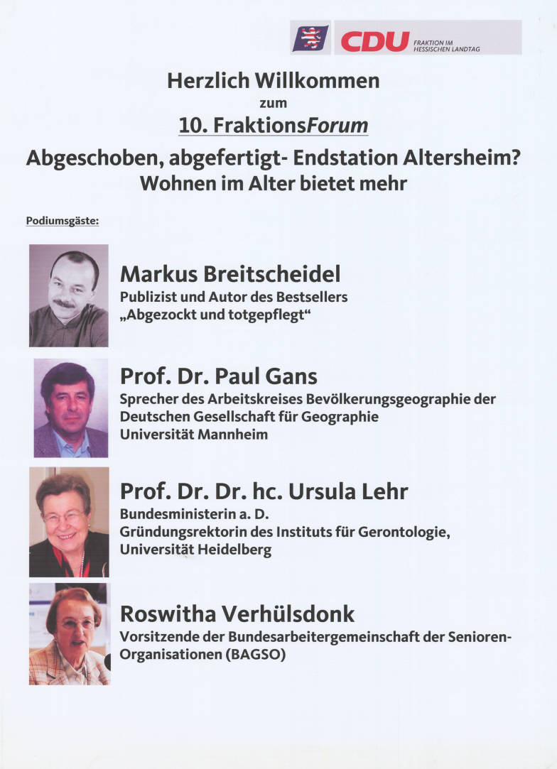 Herzlich Willkommen zum 10. FraktionsForum Abgeschoben, abgefertigt - Endstation Altersheim? Wohnen im Alter bietet mehr Podiumsgäste: Markus Breitscheidel Publizist und Autor ... Prof. Dr. Paus Gans Sprecher des Arbeitskreises Bevölkerungsgeographie der Deutschen Gesellschaft für Geographie Universität Mannheim Prof. Dr. Dr. hc. Ursula Lehr Bundesministerin a.D. ... Roswitha Verhülsdonk Vorsitzende der Bundesarbeitsgemeinschaft der Senioren-Organisationen (BAGSO) Abbildung: Porträtfotos Plakatart: Ankündigungsplakat Auftraggeber: CDU Fraktion im Hessischen Landtag Objekt-Signatur: 10-031 : 80 Bestand: CDU-Plakate (10-031) GliederungBestand10-18: CDU-Plakate (10-031) » Parteitage, Parteikongresse Lizenz: KAS/ACDP 10-031 : 80 CC-BY-SA 3.0 DE